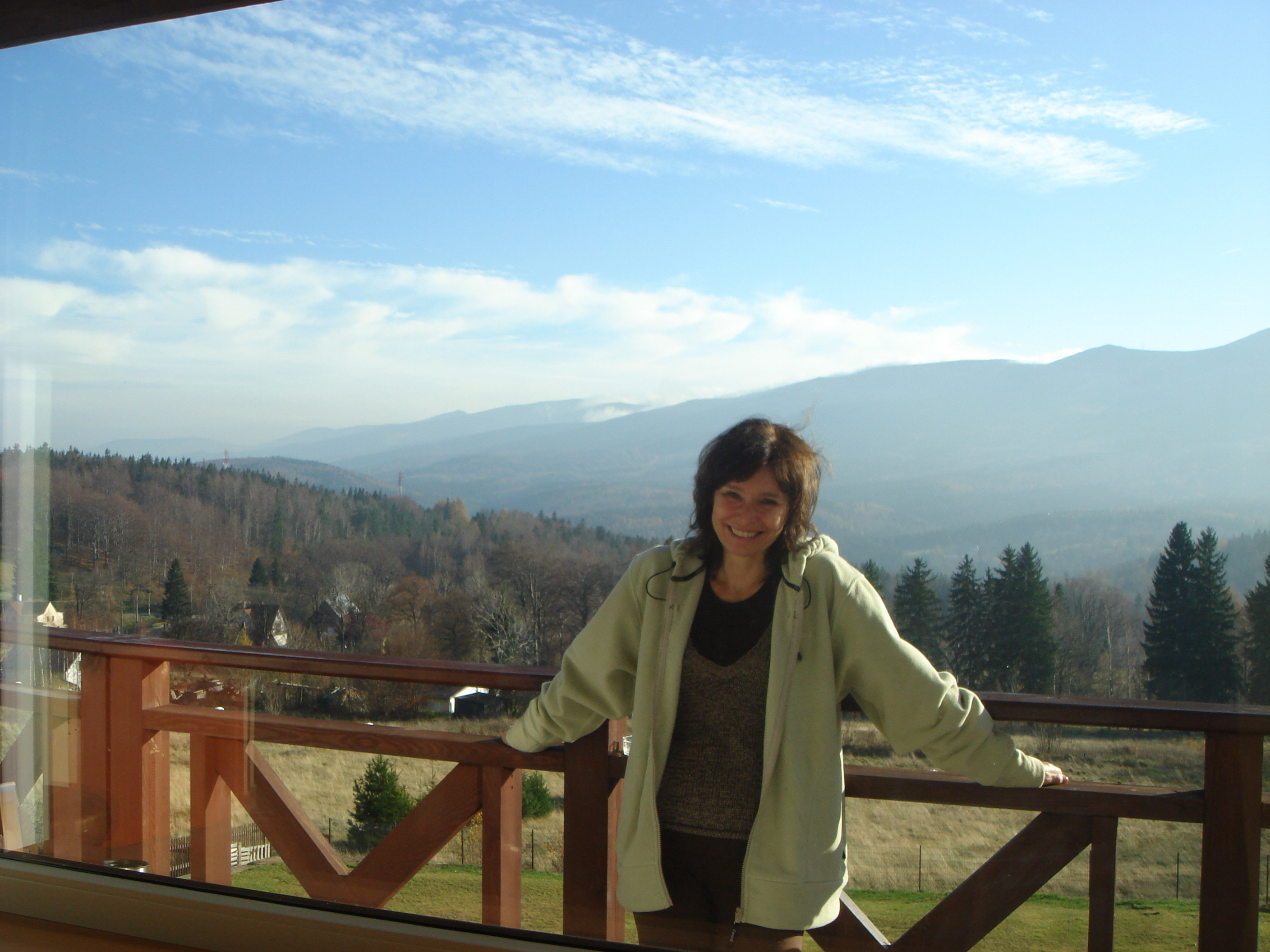 Prof. dr hab. Beata Sierocka (ur. 17 lipca 1950, we Wrocławiu) - profesor filozofii, specjalizuje się w filozofii lingwistycznej, transcendentalno-pragmatycznej i krytyczno-hermeneutycznej. Obecnie dziekan Wydziału Nauk Społecznych i Dziennikarstwa w Dolnośląskiej Szkole Wyższej we Wrocławiu.